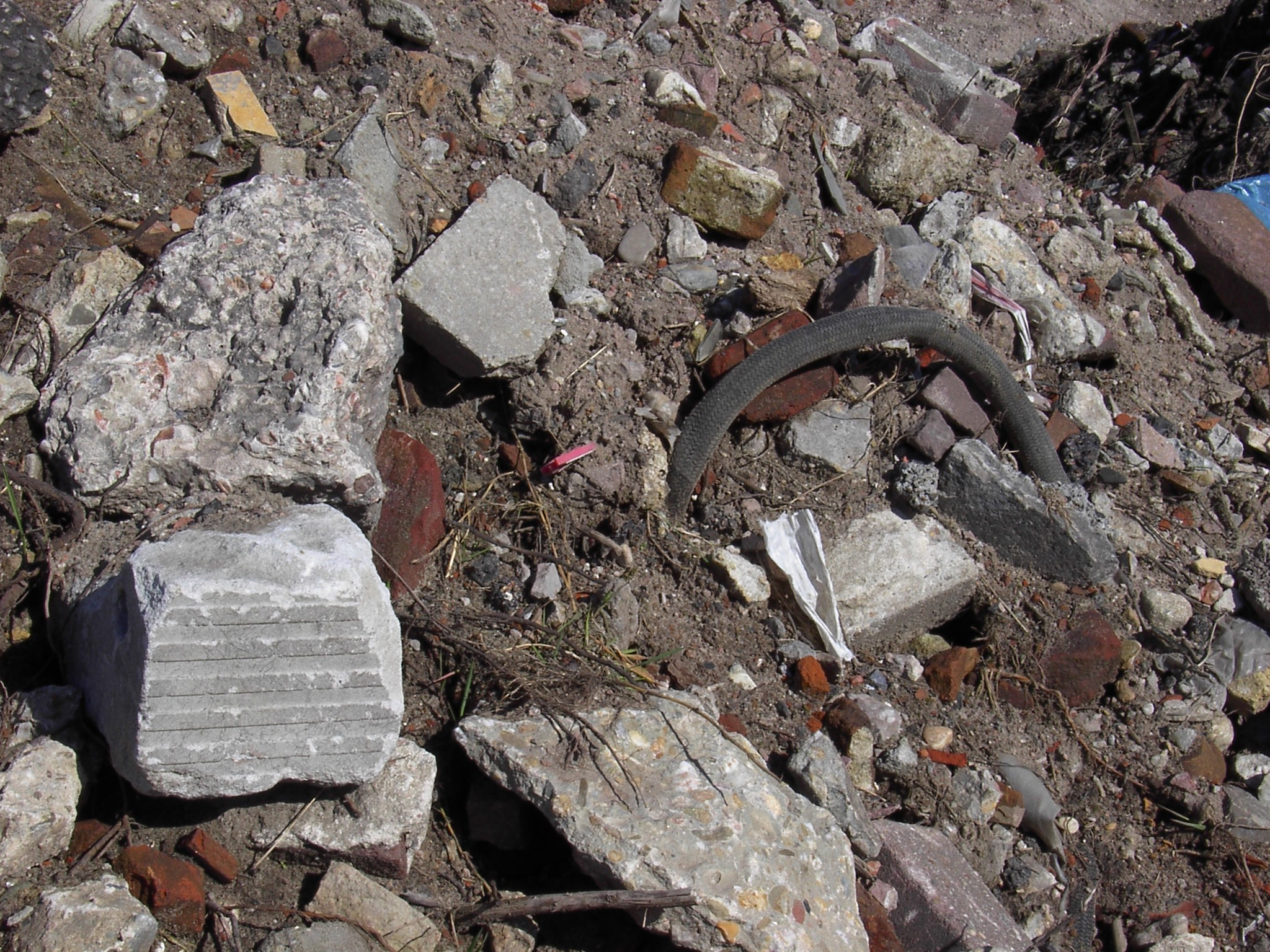 Puin op het braakliggende terrein van de voormalige Golden Wonder fabriek in Zwolle.